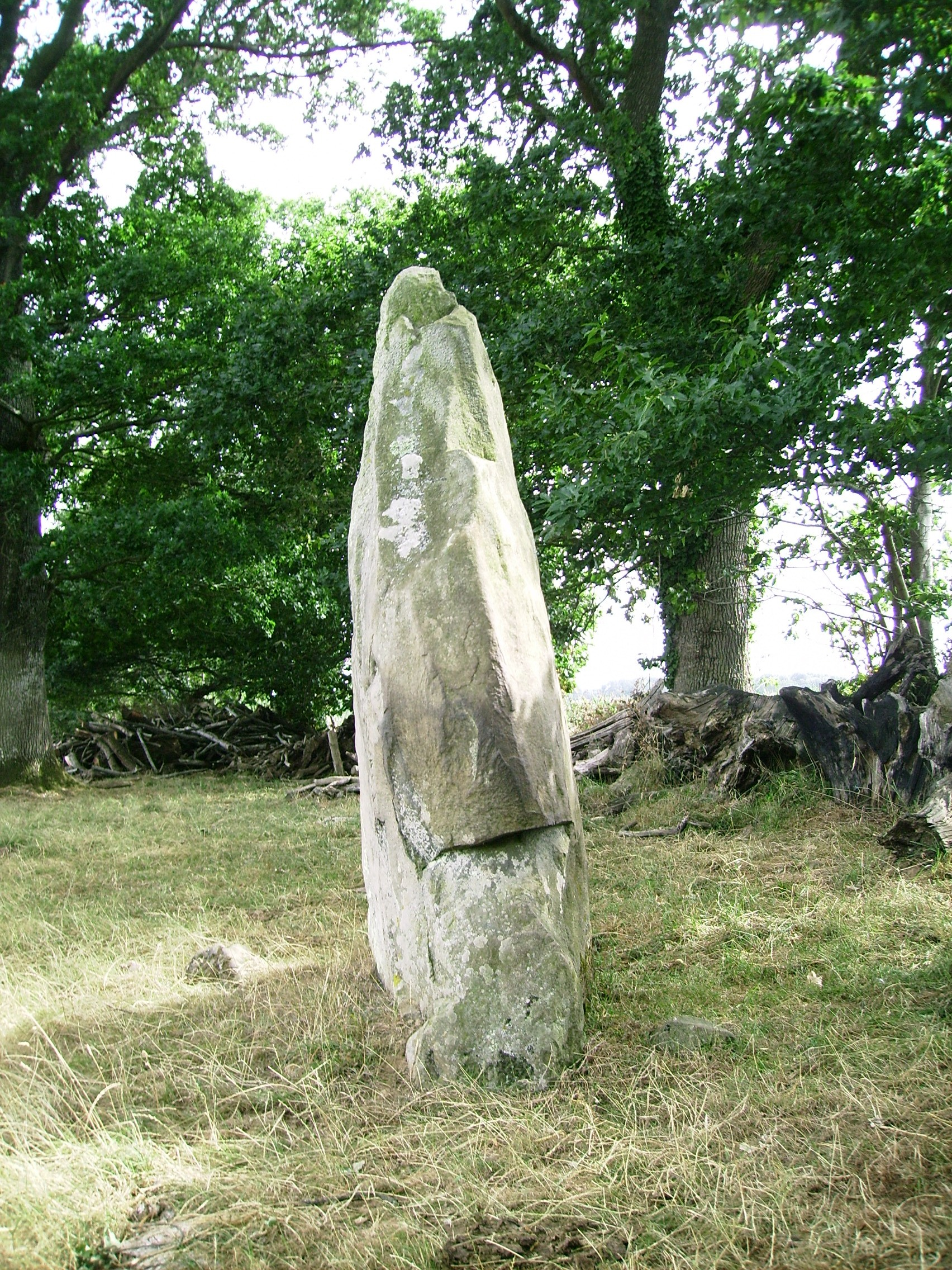 Menhir de Saint Civière de face, Le Pas, Mayenne